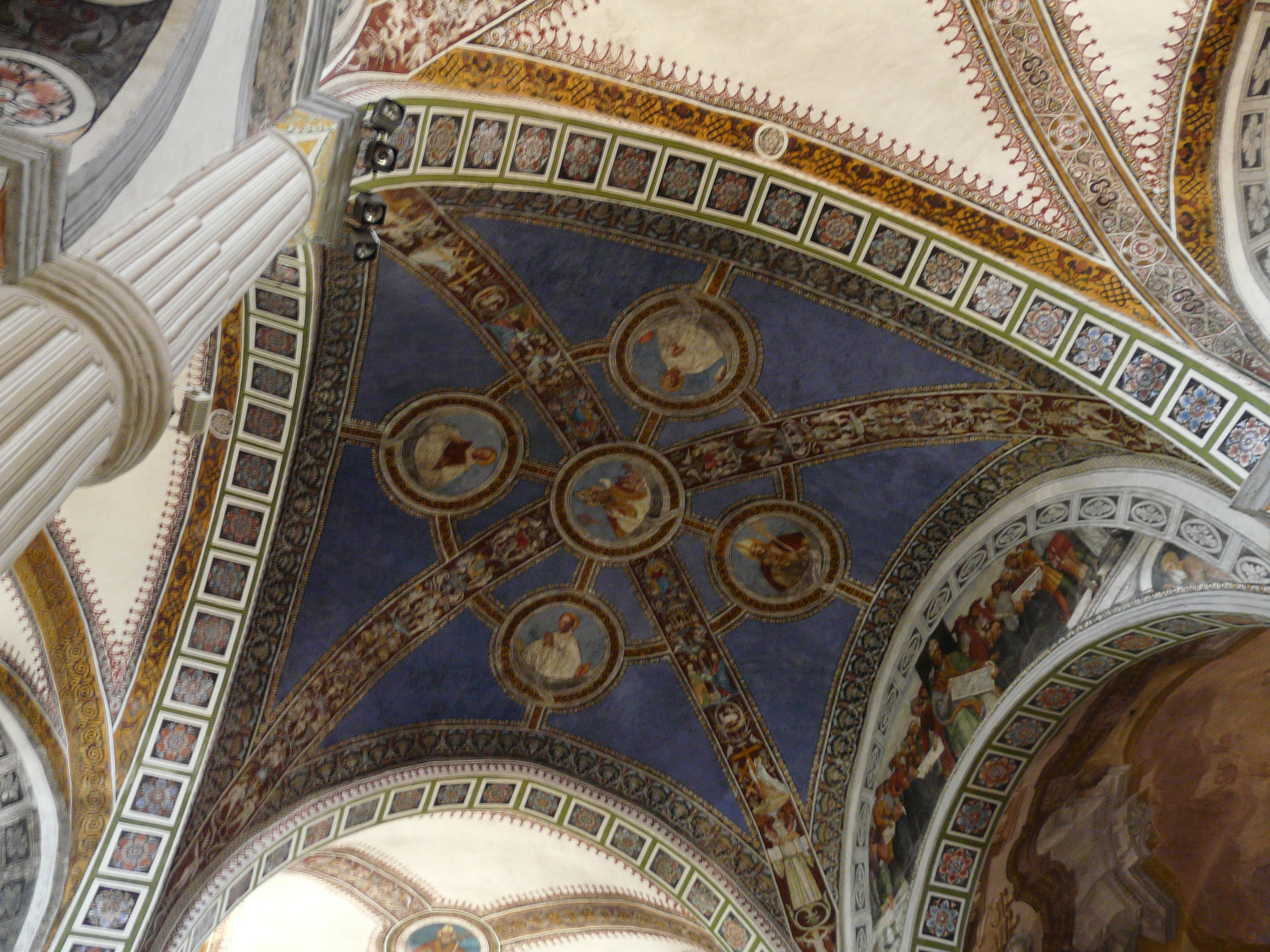 Immagini dell'abbazia di San Colombano di Bobbio, Emilia-Romagna, Italia